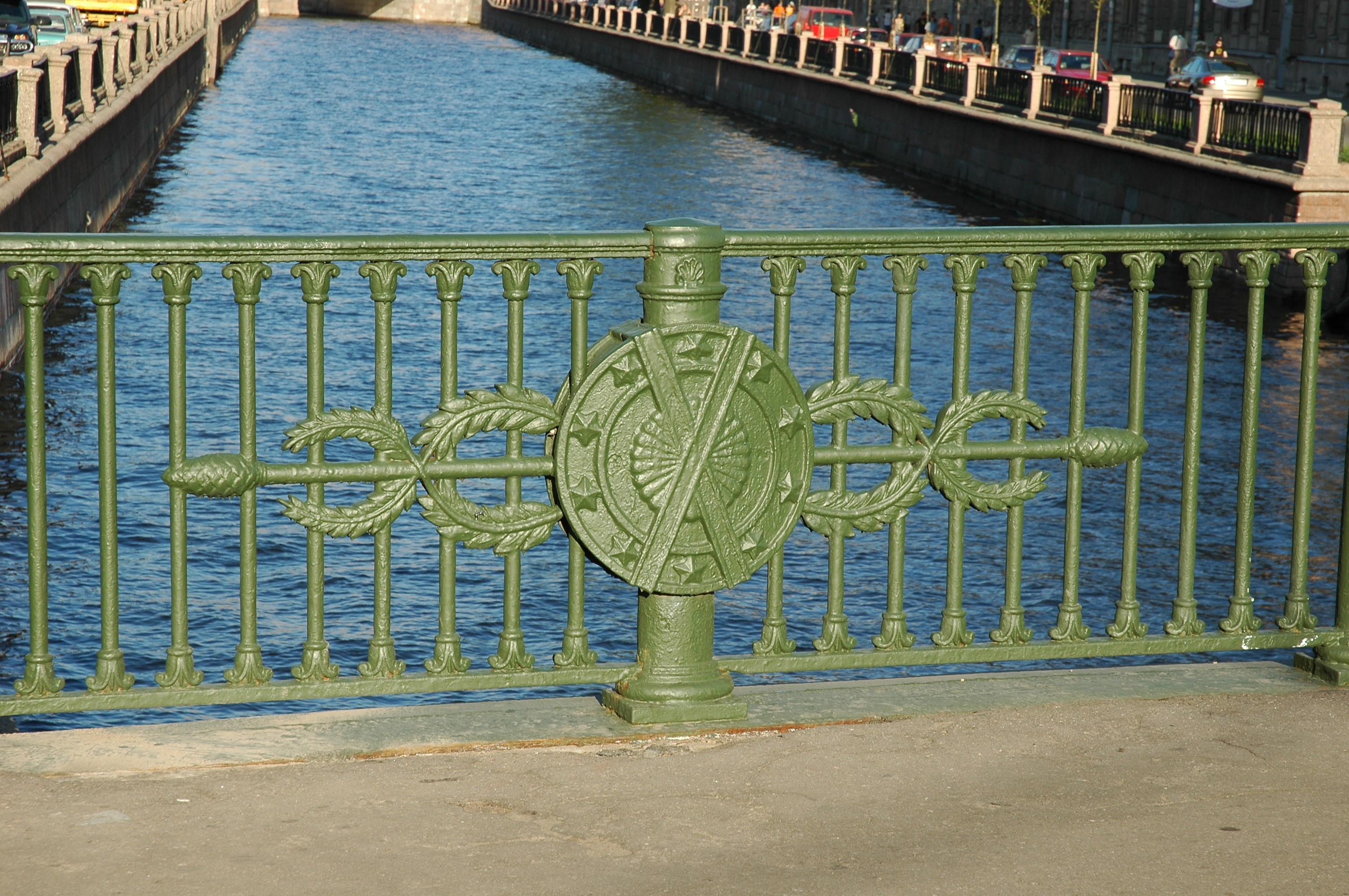 Fence detail: Voznesenskii Bridge, Griboedov canal (St Petersburg, Russia)